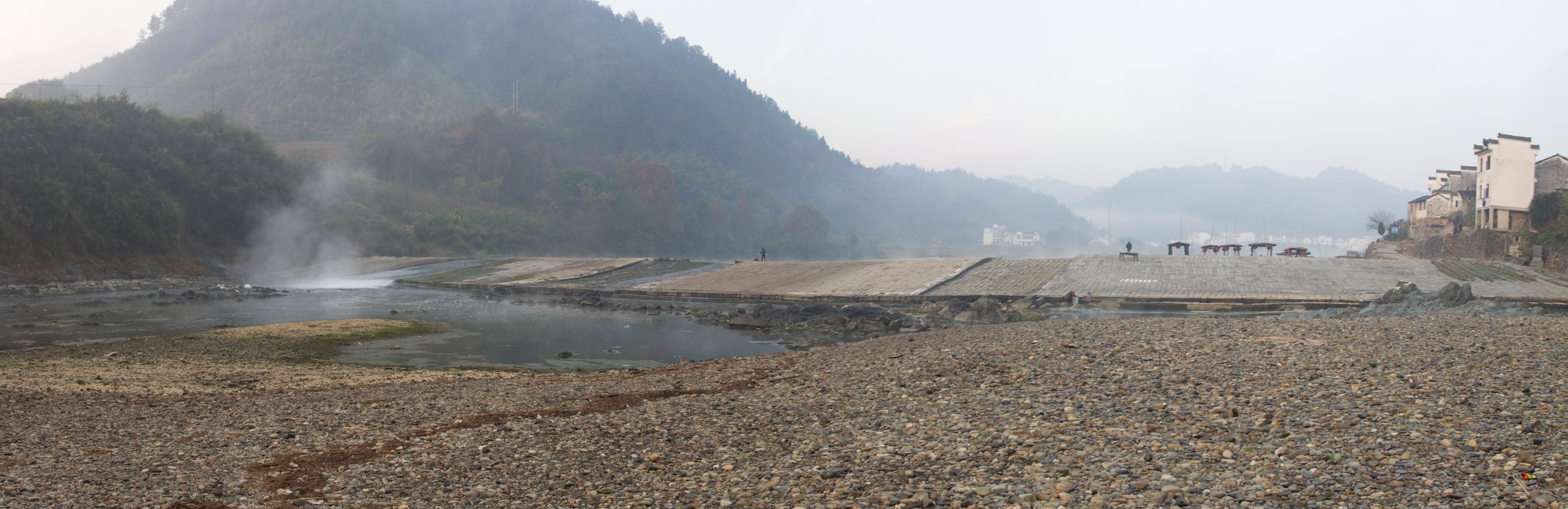 渔梁坝，全国重点文物保护单位，位于歙县。